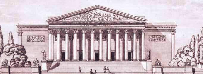 Le fronton du Palais Bourbon portait un motif à la gloire de Napoléon